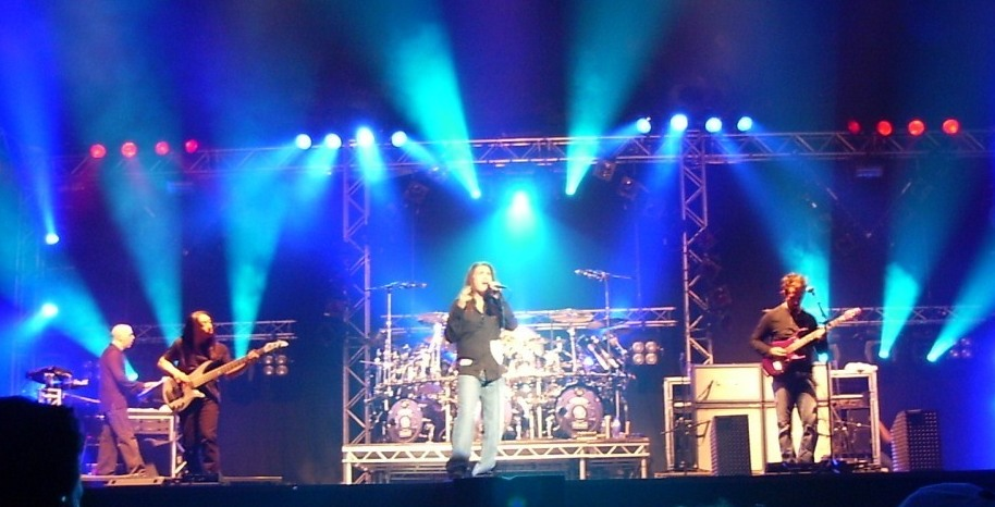 Lente 2005, Dream Theater speelt op het Arrow Rock Festival in Lichtenvoorde.